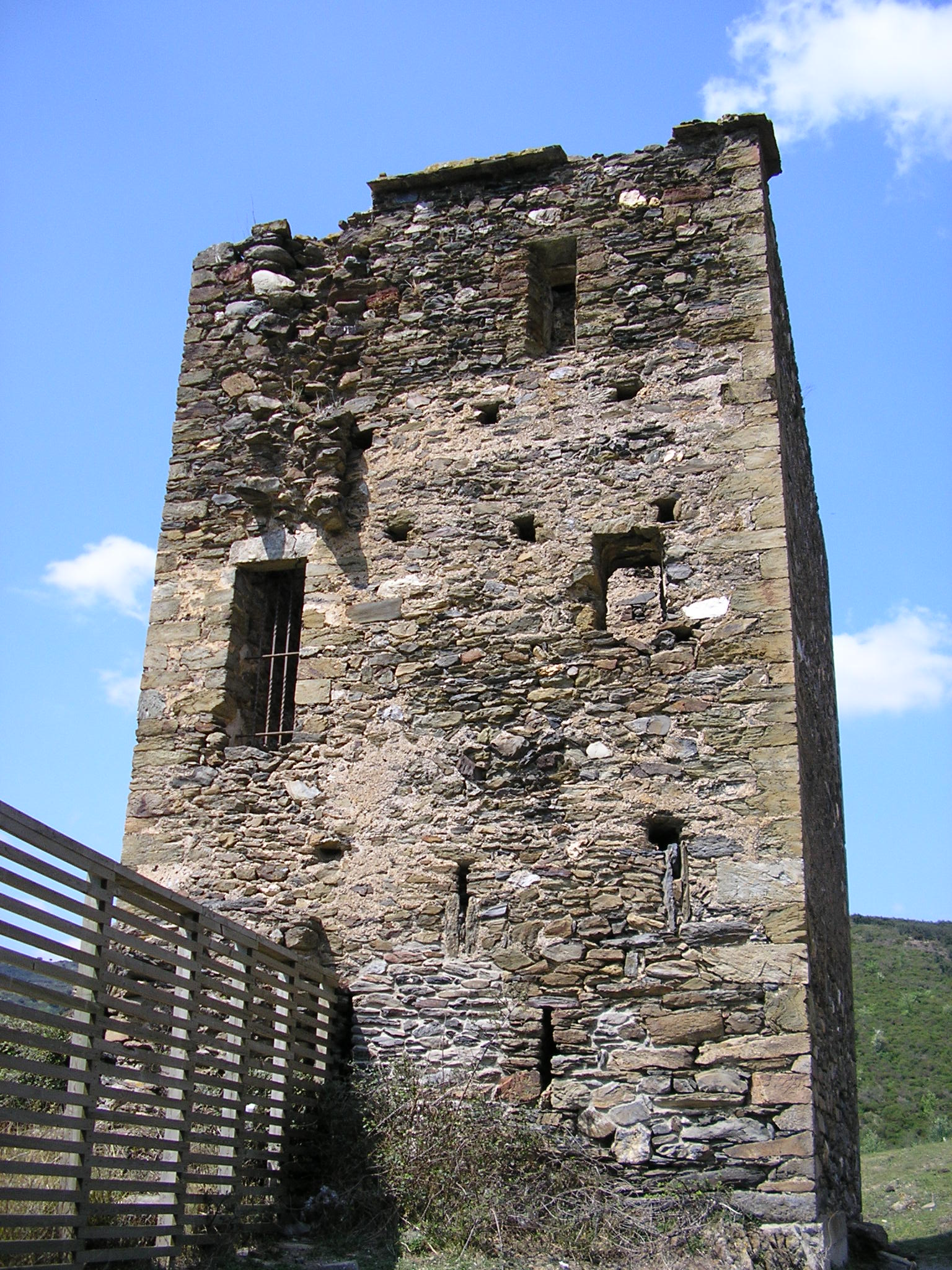 Monasterio de Sant Quirze de Colera - Torre de Defensa